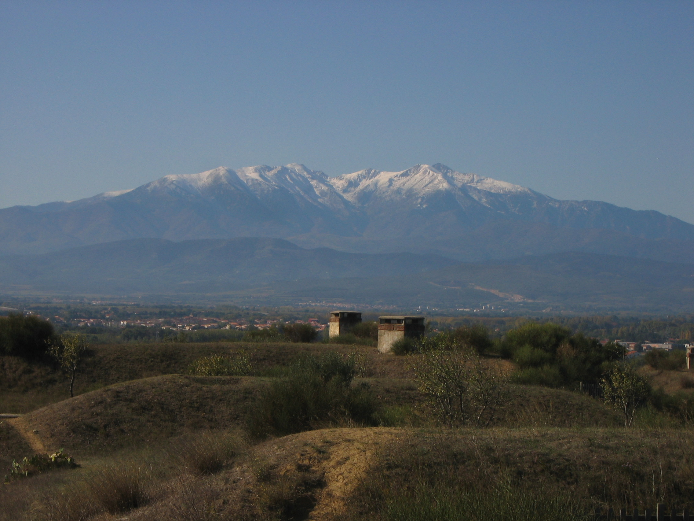 Le Canigou vu du Serrat d'en Vaquer à Perpignan (Pyrénées-Orientales, France).